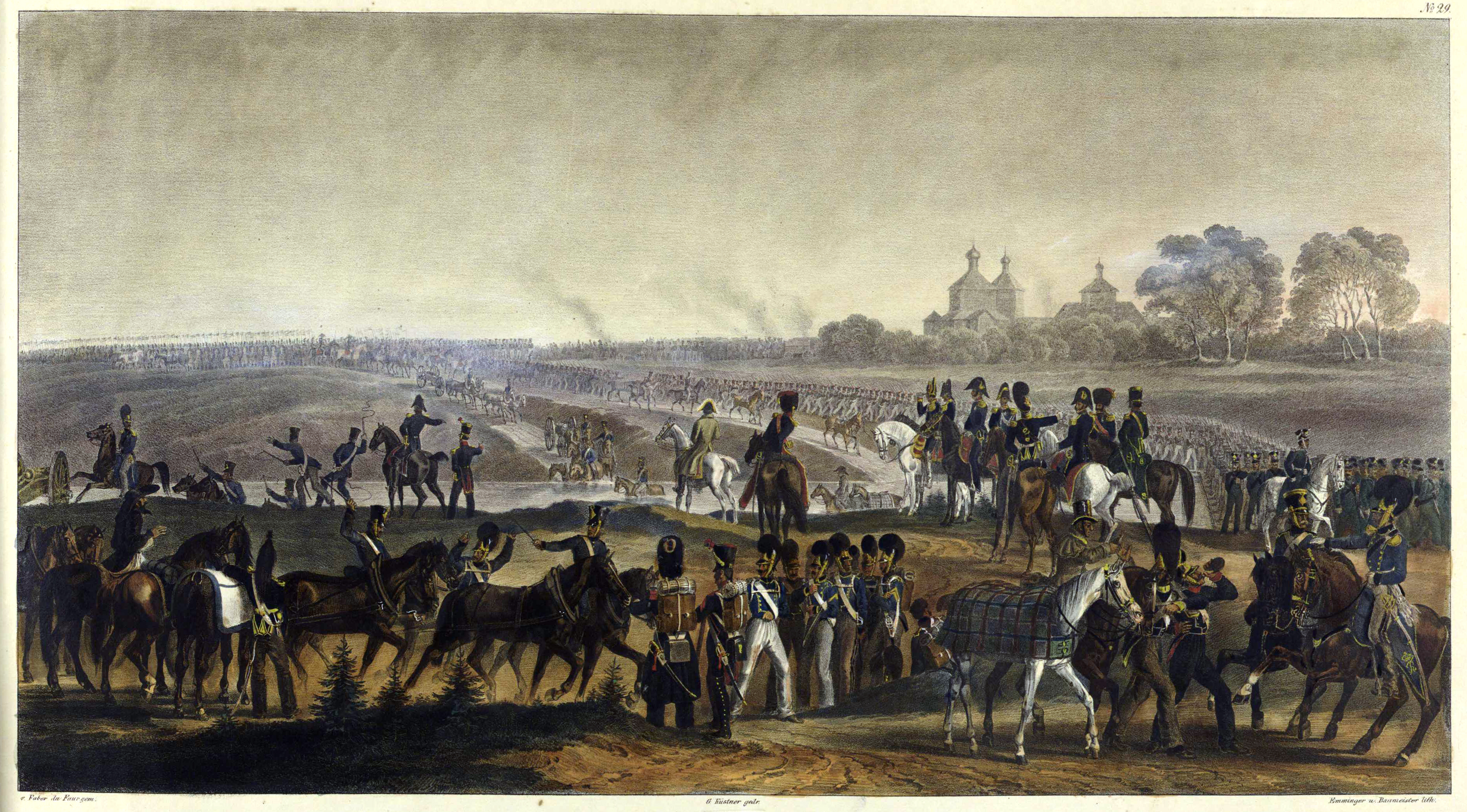 Беларуская (тарашкевіца): Пераход праз Дняпро (Dniapro), 14 жніўня 1812